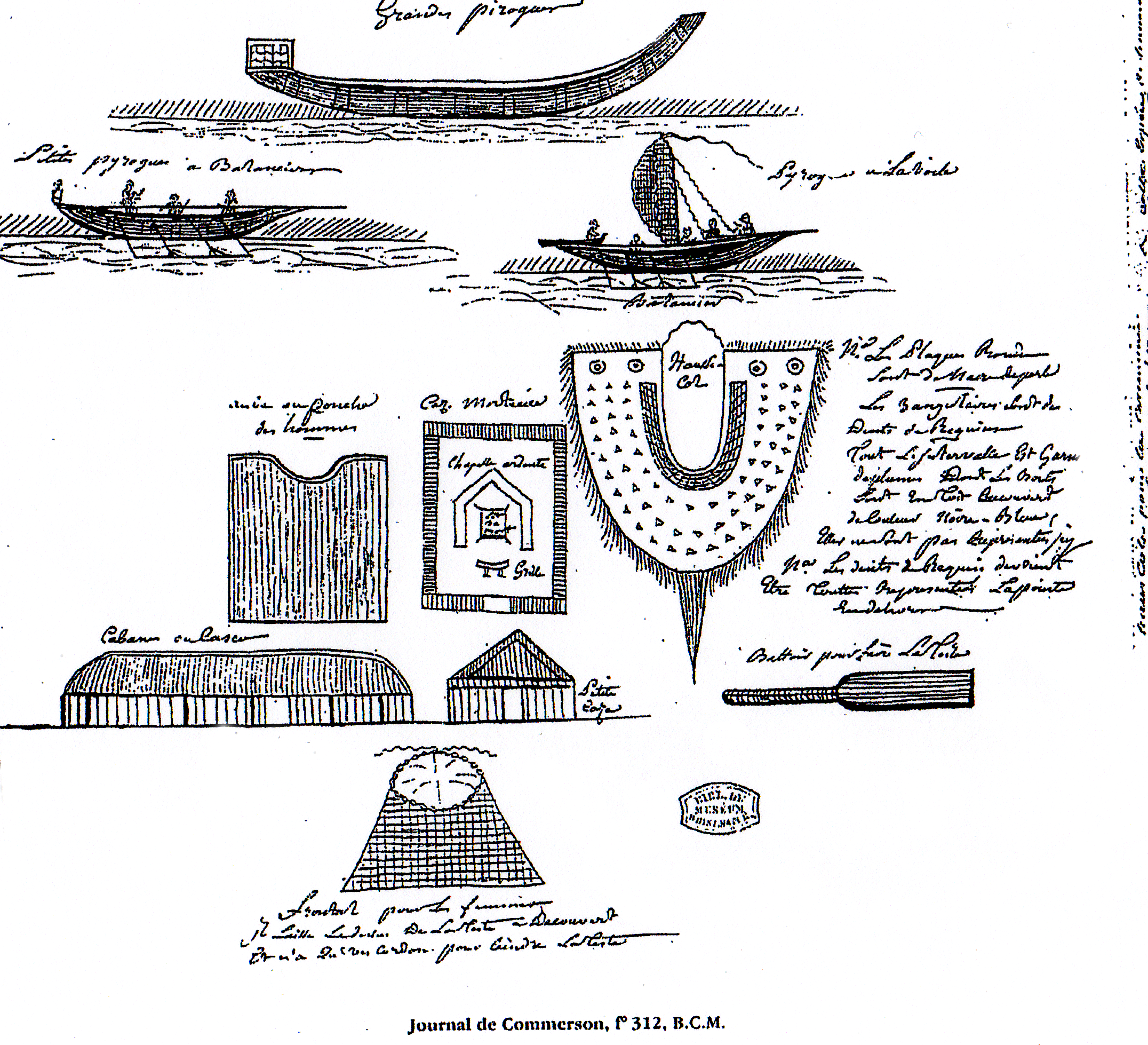 Dessins tirés du Journal de Commerson, f° 312, B.C.M. Pirogue de Tahiti, lors du Voyage autour du monde de Bougainville, 1768